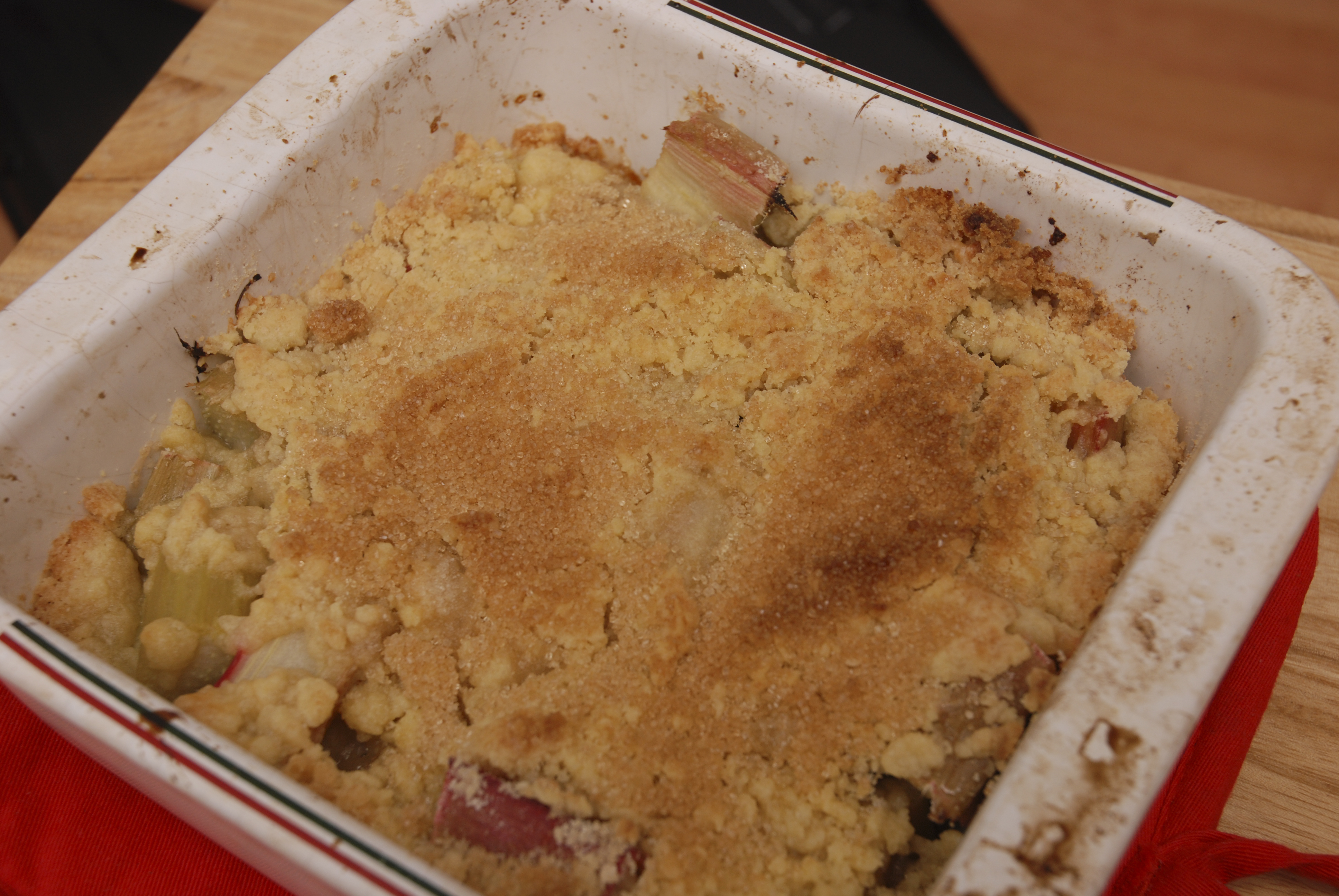 Rhubarb crumble